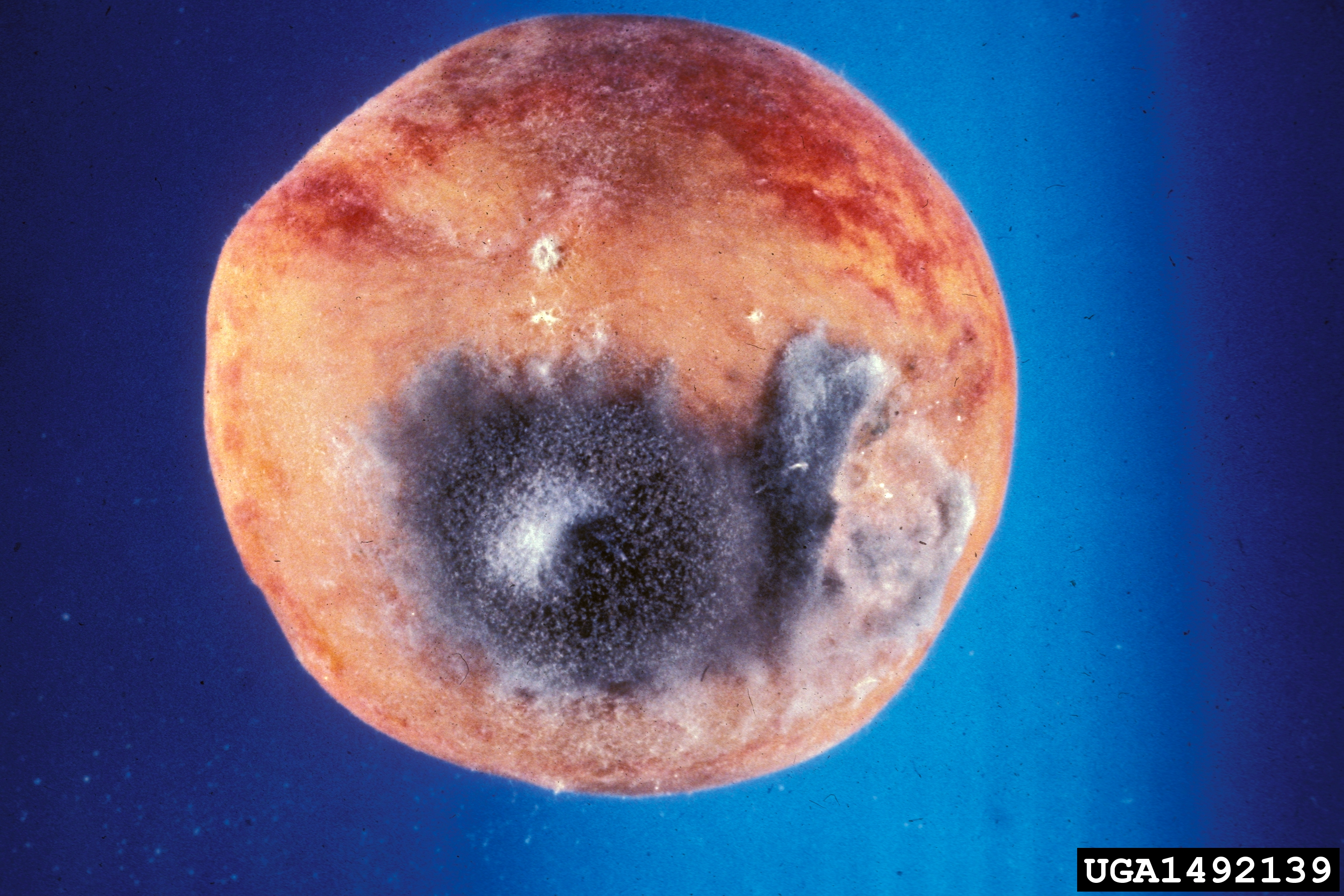 Rhizopus stolonifer var. stolonifer (Ehrenb.) Vuill. sur persiko - vidu ankaux